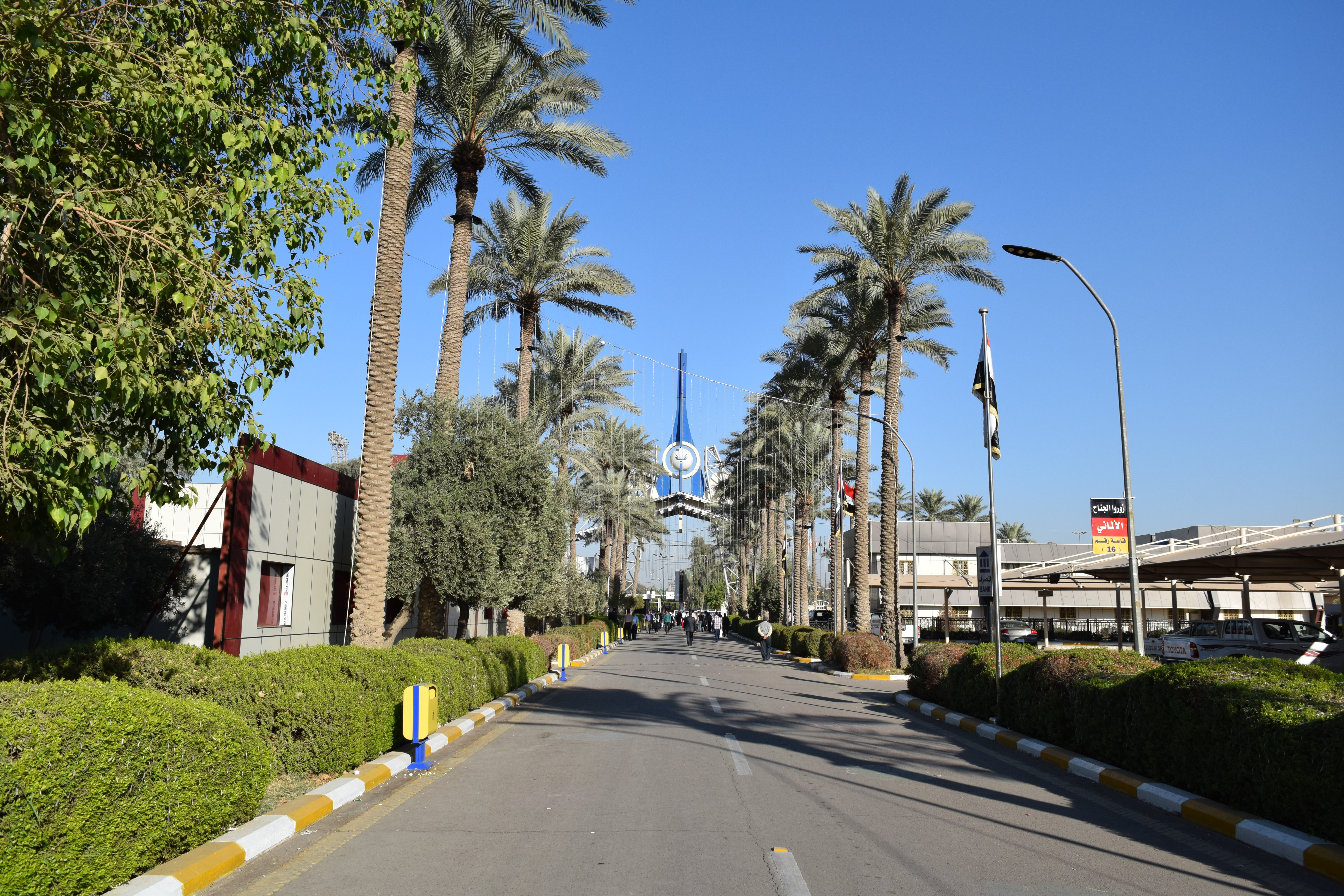 هذه الصورة لمدخل معرض بغداد الدولي